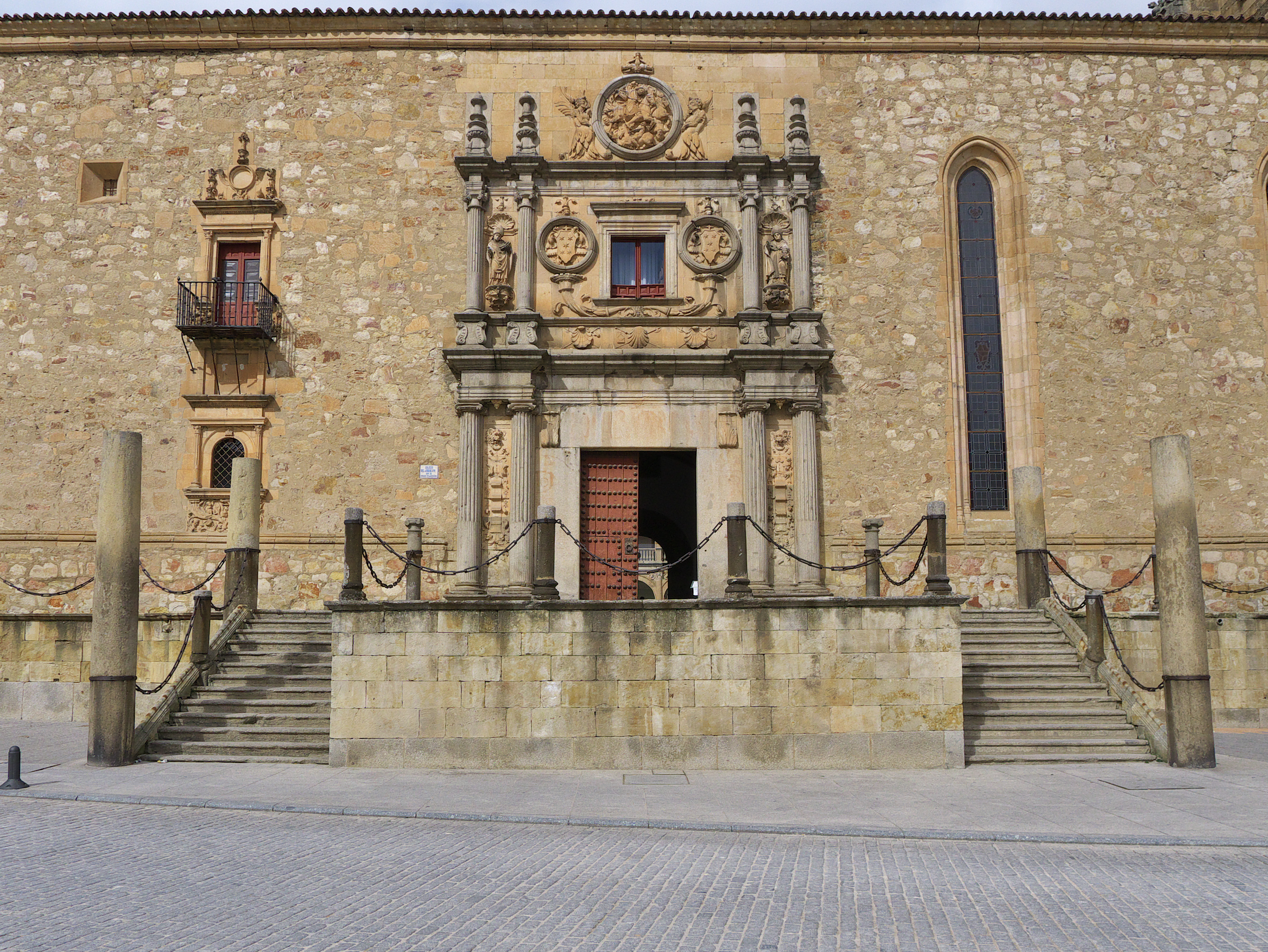 Juan de Álava ejecuta la portada del colegio, continuando el proyecto de Diego de Siloé y bajo el programa ideológico del rector Fernán Pérez de Oliva (1529-1534)